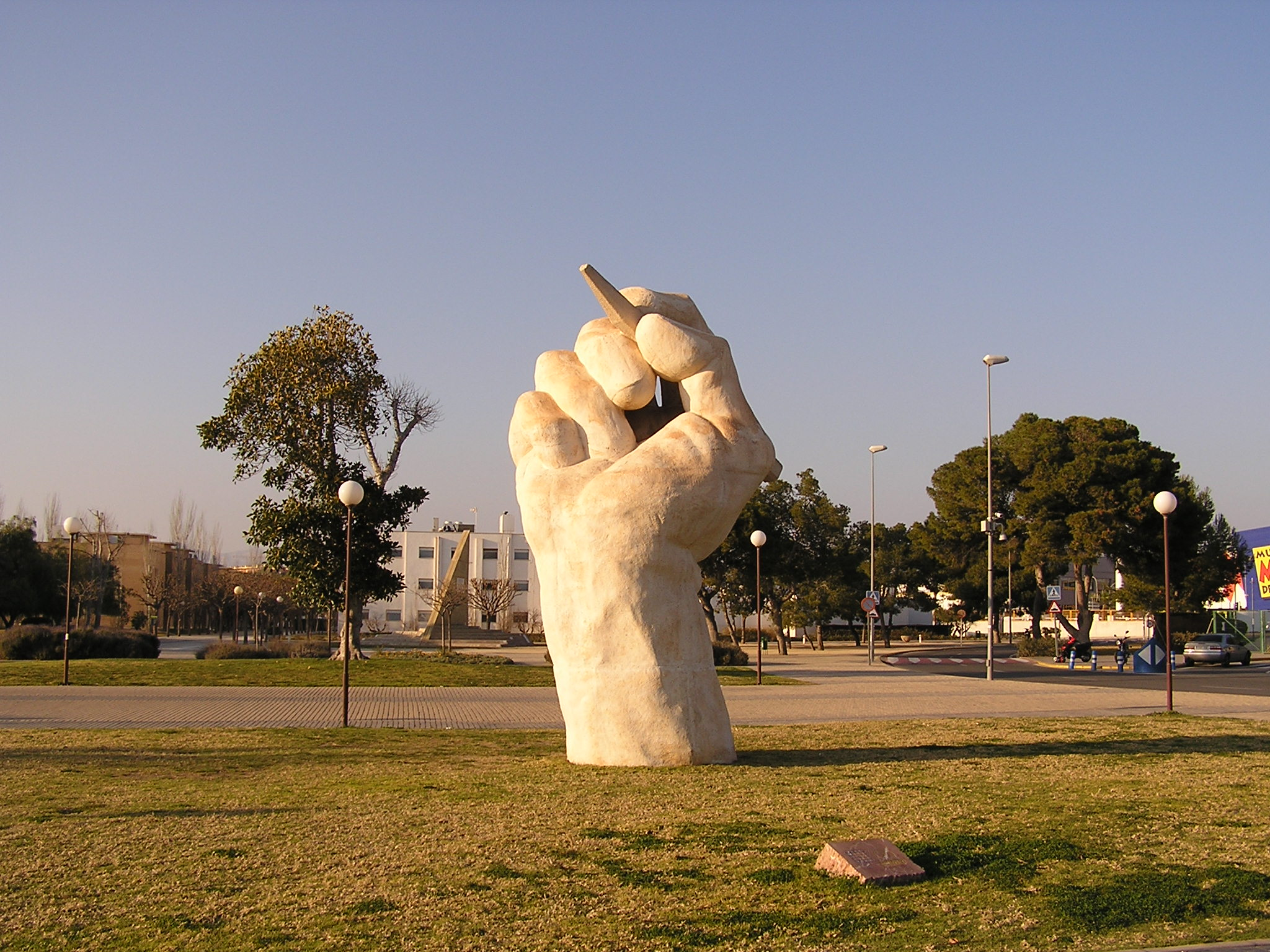 Dibuixar l'espai. Campus Universitat d'Alacant - Universitätscampus Universität Alicante - Campus University of Alicante - Campus Universidad de Alicante - Campus Université d'Alicante - Campus Università di Alicante